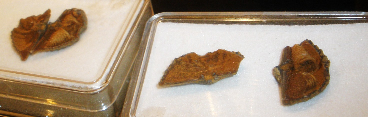 Fossil of brachiopods, extinct animals- Took the photo at Fossil Show, Munchen 2011